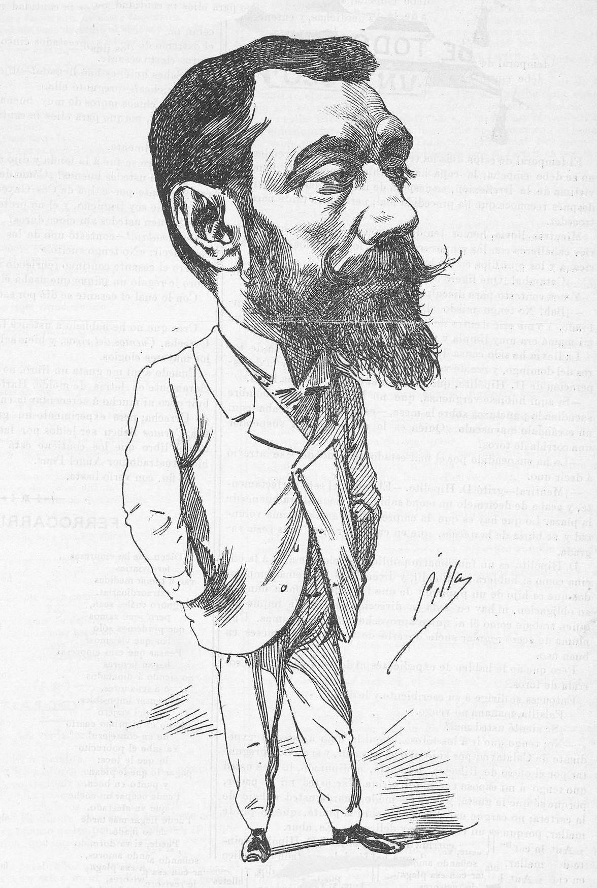 Manuel Alcázar.